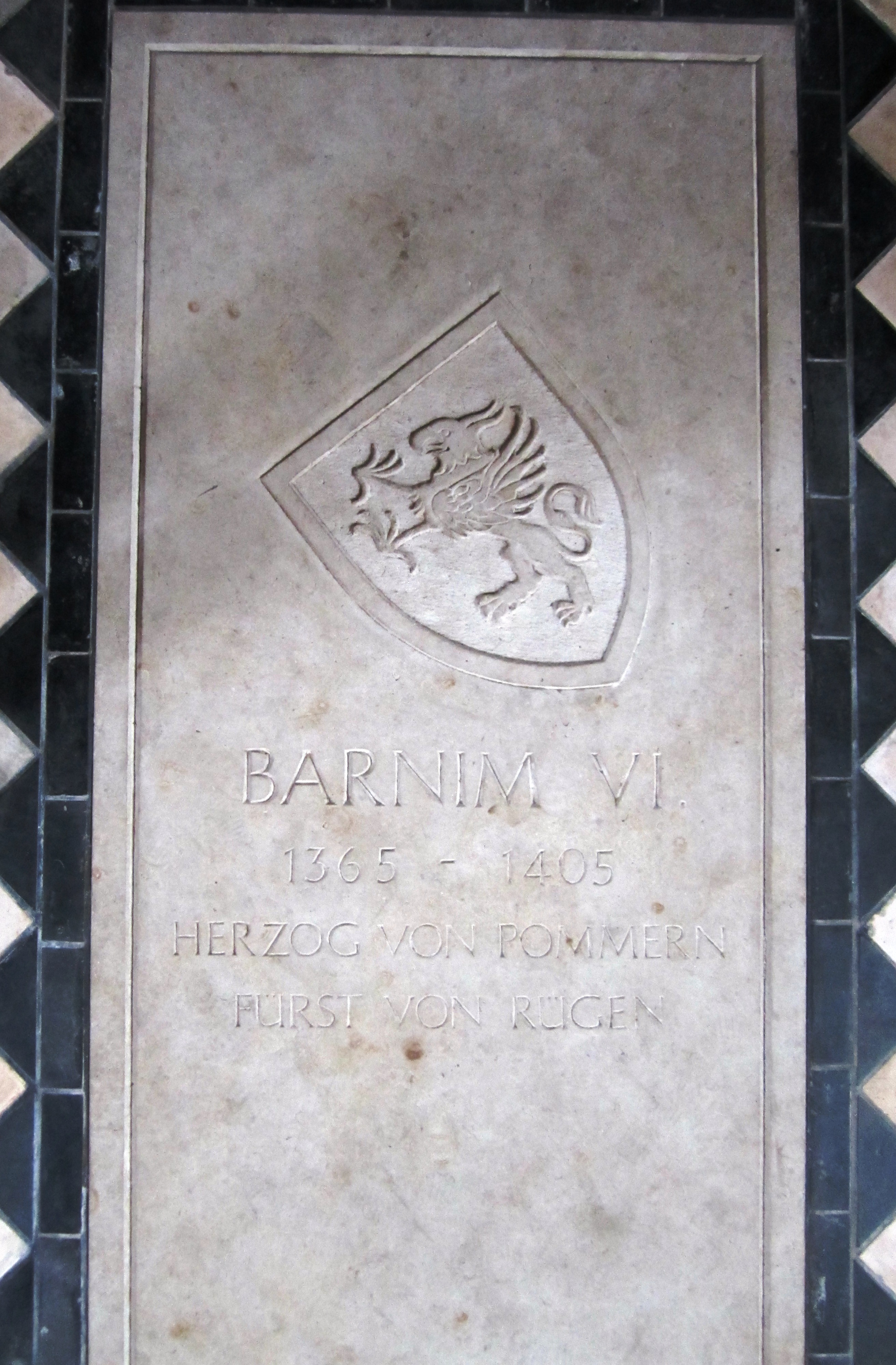 Grabplatte für Herzog Barnim VI. von Pommern († 22. September 1405) in der Kirche von Kenz